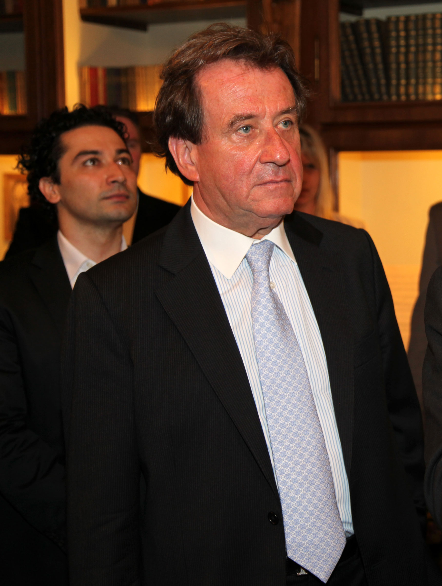 Buchbinder_Rudolf-5398 ; 19.08.2010: Musik-Festival Grafenegg